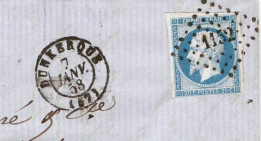 Fragment de lettre de France (Dunkerque) affranchie avec un 20 c bleu de 1854 et oblitérée par un cachet petits chiffres 1152